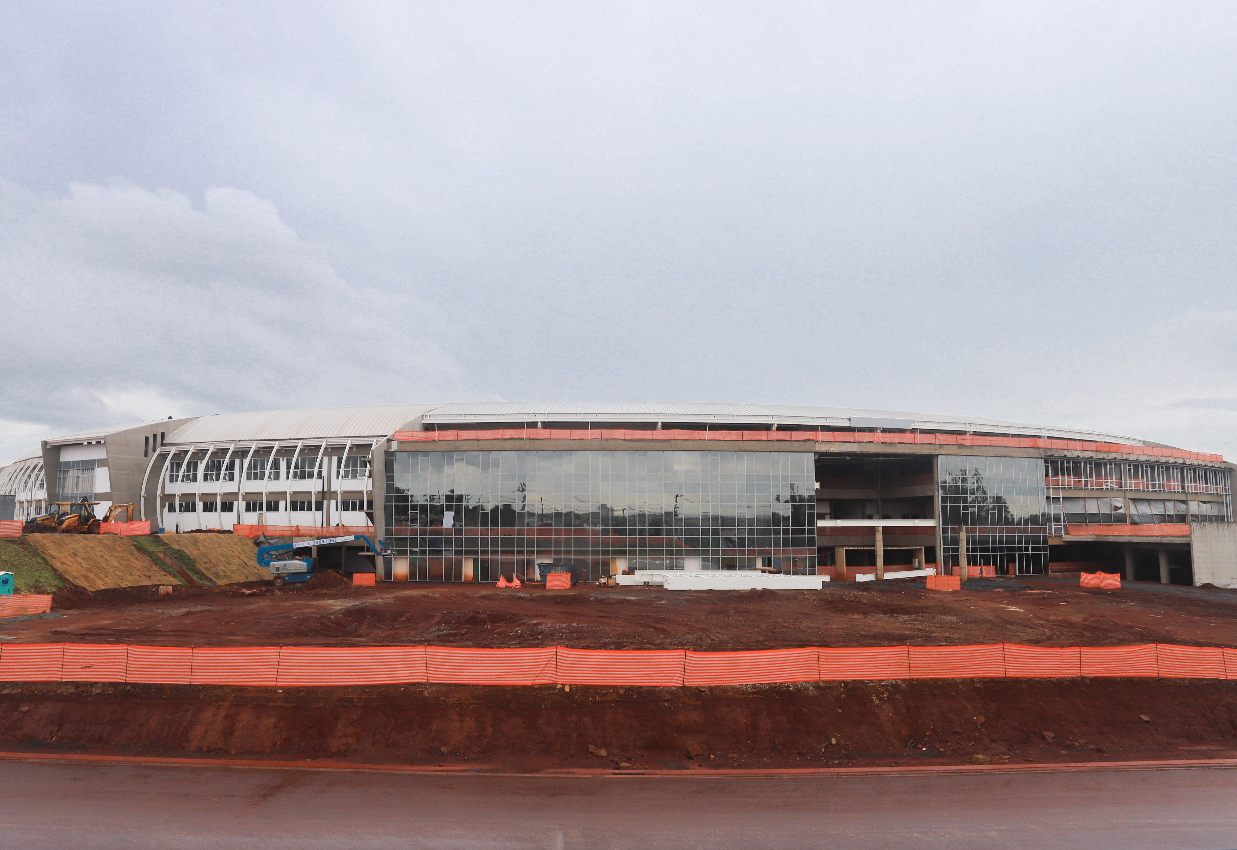 O Governador do Estado de São Paulo, Geraldo Alckmin, participa de visita ao Projeto Sirius, no CNPEM. Local: Campinas/SP Data: 15/02/2018 Foto: Governo do Estado de São Paulo